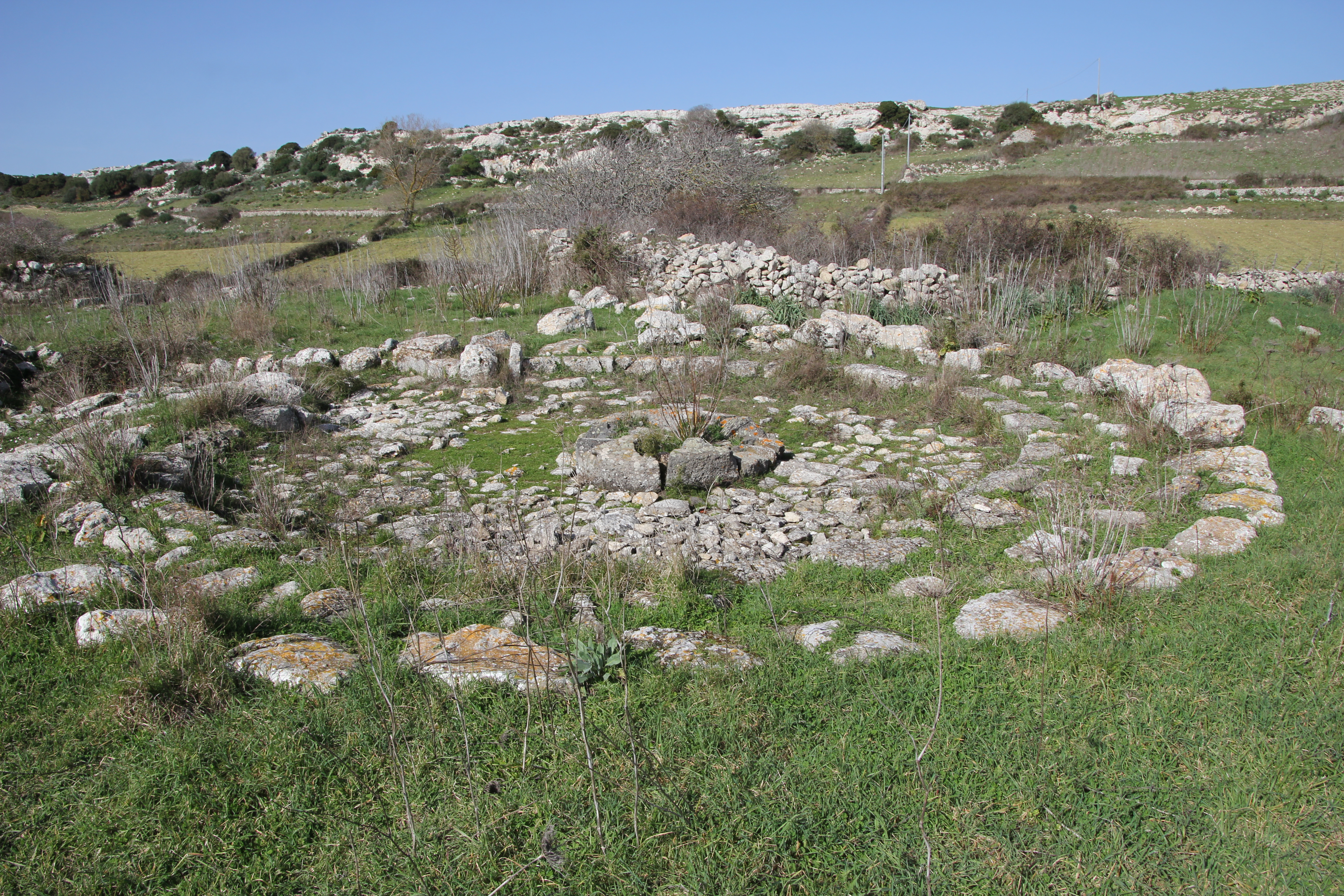 Florinas, area archeologica di Punta Unossi